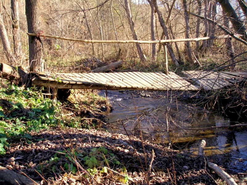 Potok Sopotnica v katastri obce Sedlice okres Prešov